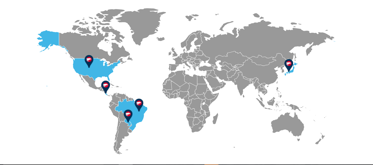 Gráfico exemplifica presença mundial da Wizard by Pearson